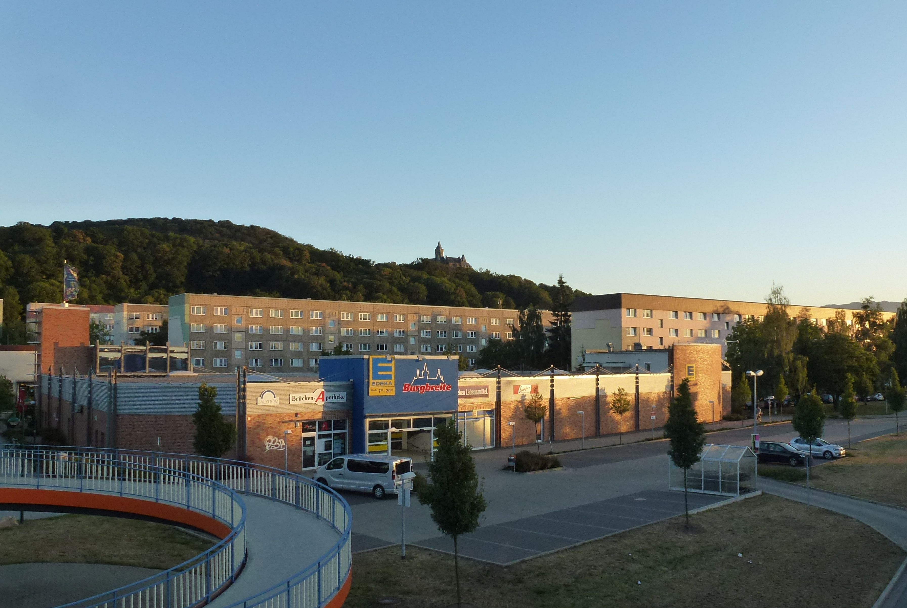 Blick vom Kilianskreisel auf die Burgbreite mit Supermarkt.